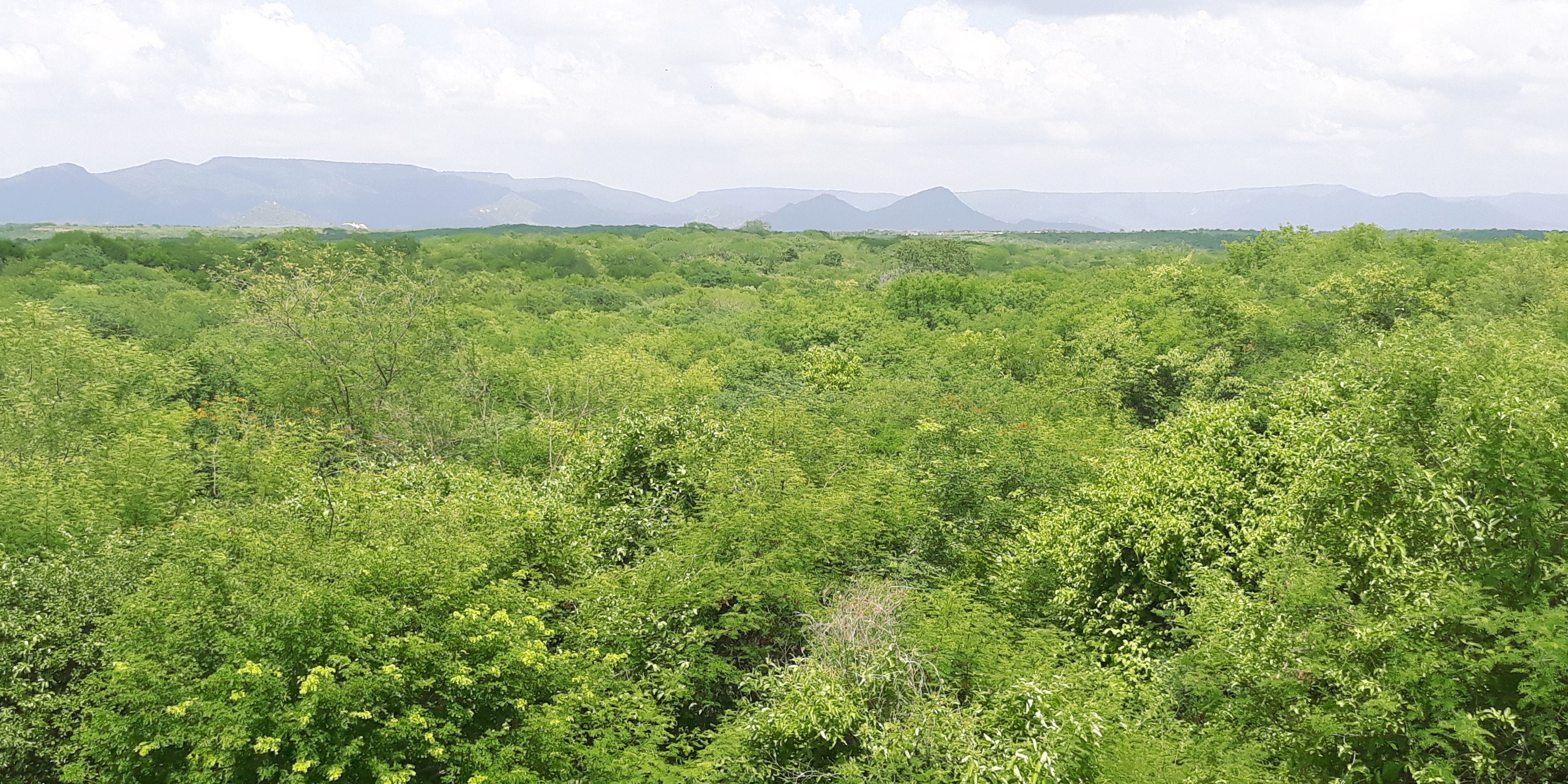 Caatinga hiperxerófila, vegetação típica do Sertão nordestino, durante o período chuvoso, no município de Pau dos Ferros, Rio Grande do Norte, Brasil